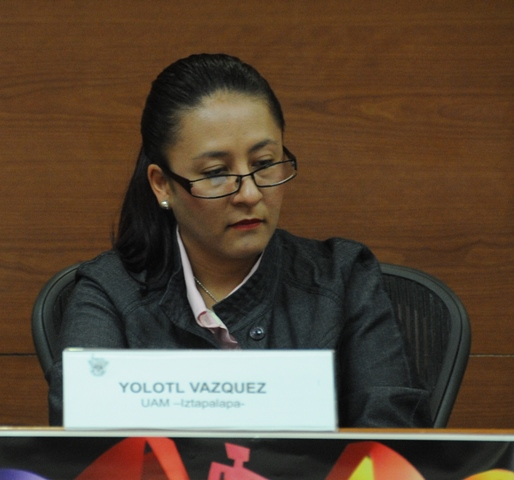 Yolotl Vázquez de la Universidad Autónoma Metropolitana - Iztapalapa en el segundo Coloquio Internacional “Nuevas narrativas mexicanas: desde la diversidad” en el ITESM-Campus Ciudad de Mexico